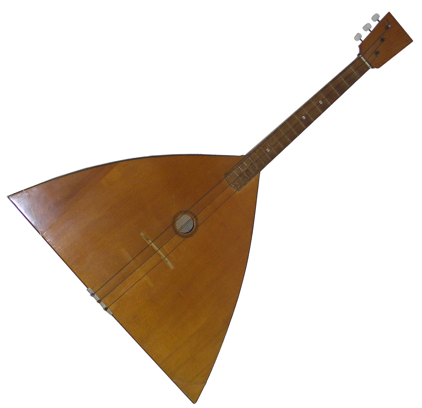 Balalaika Tenor